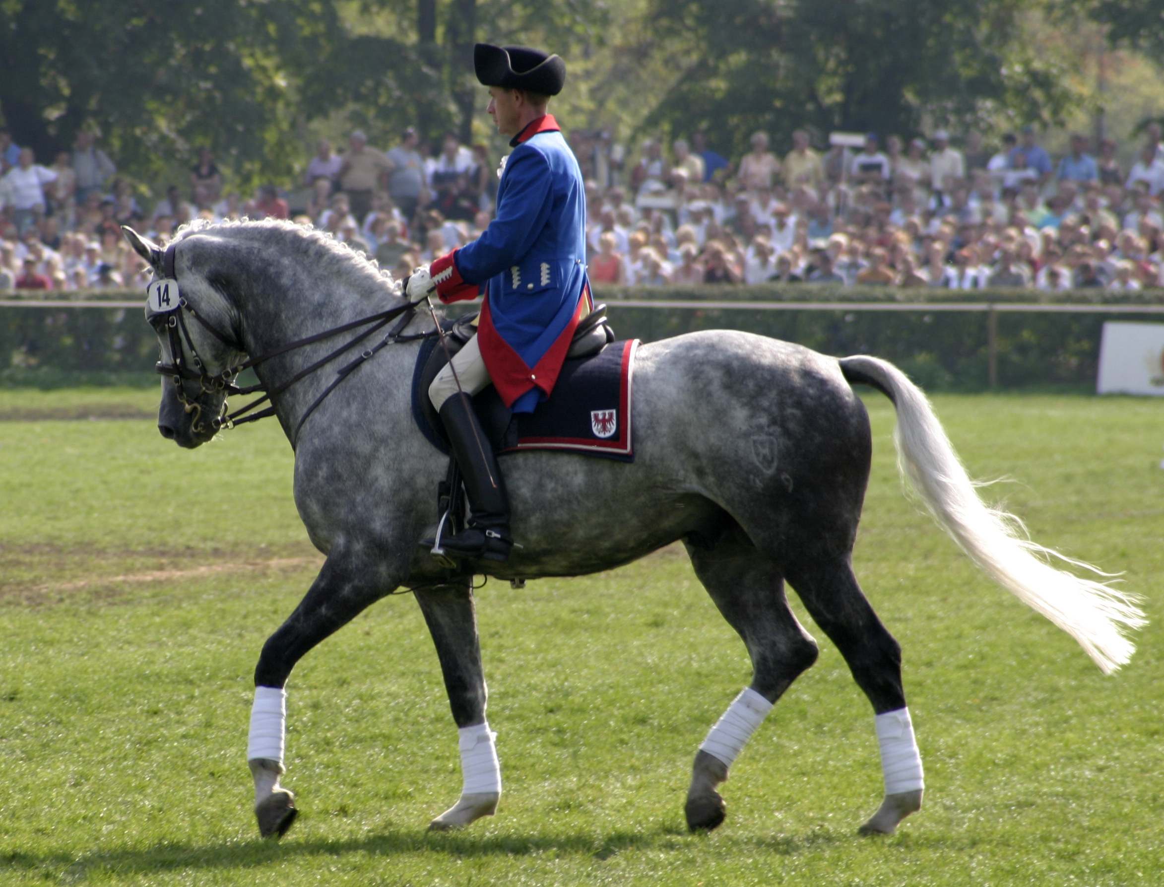 Holsteiner Hengst auf der Hengstparade im Haupt- und Landgestüt Neustadt a.d. Dosse